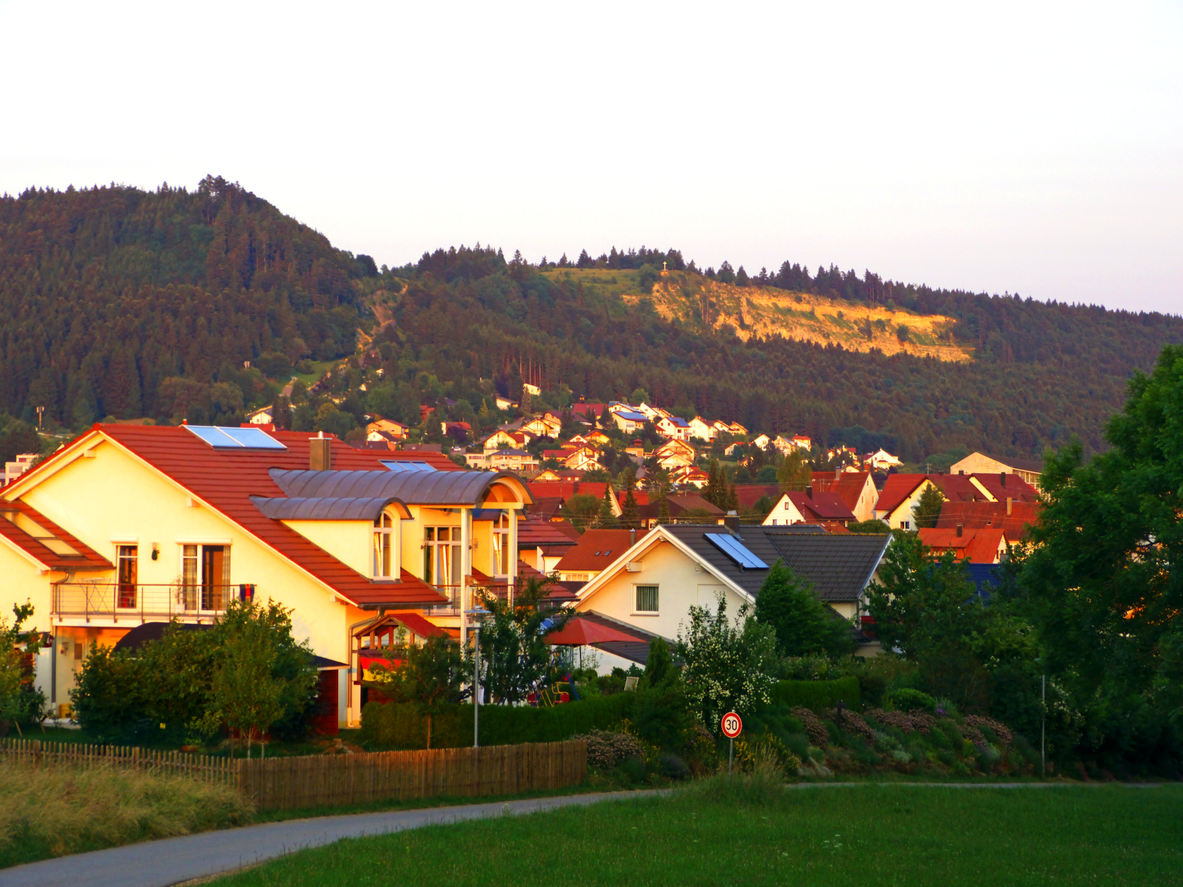 Gosheim